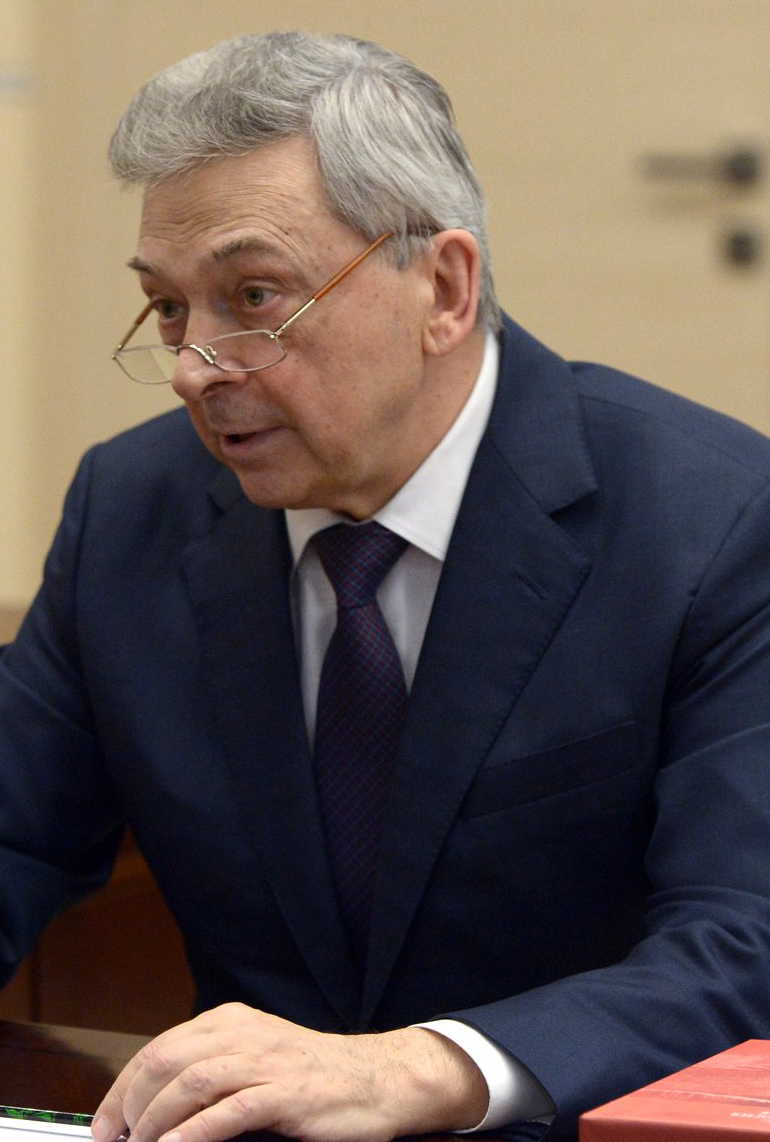 Вице-президент Российской академии наук, главный эндокринолог Министерства здравоохранения, заслуженный деятель науки Иван Дедовым во время встречи с президентом России Владимиром Путиным